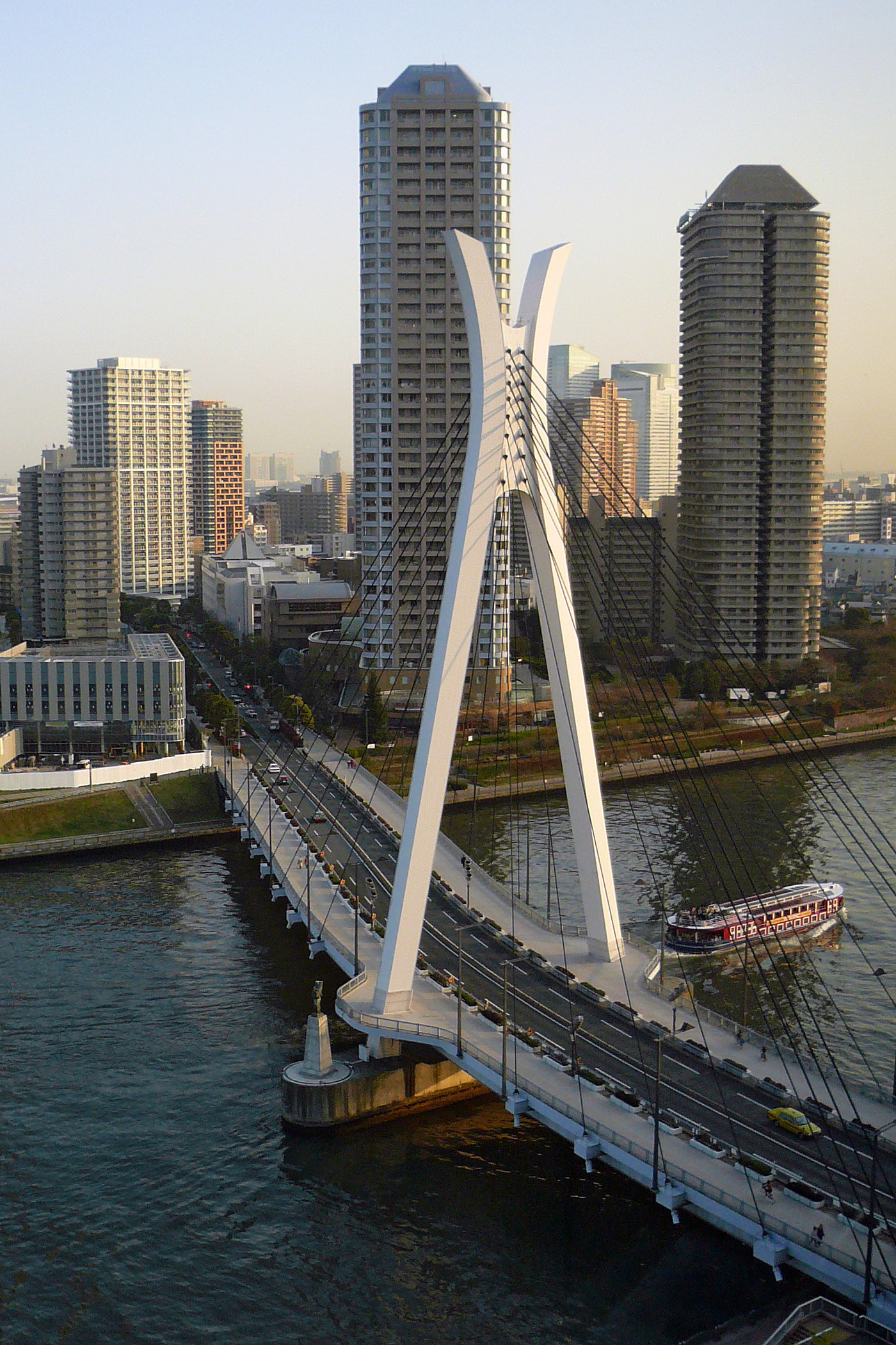 Sumida River at Shinkawa in Chuo-ku, Tokyo, Japan